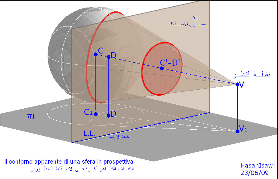 link* My personal site Licensing تصنيف:هندسة وصفية